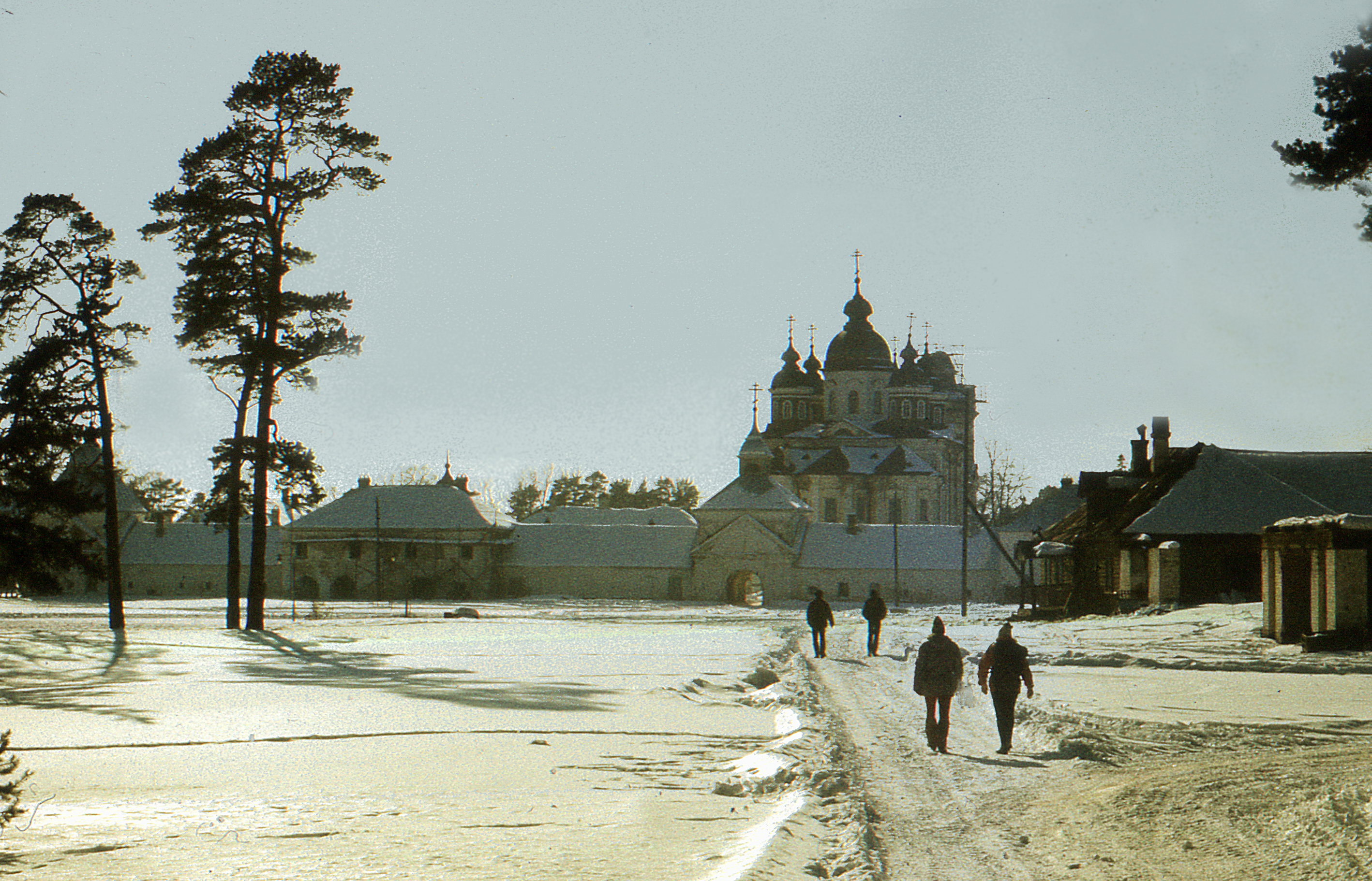 Коневецкий монастырь зимой. Вид от Конь-камня